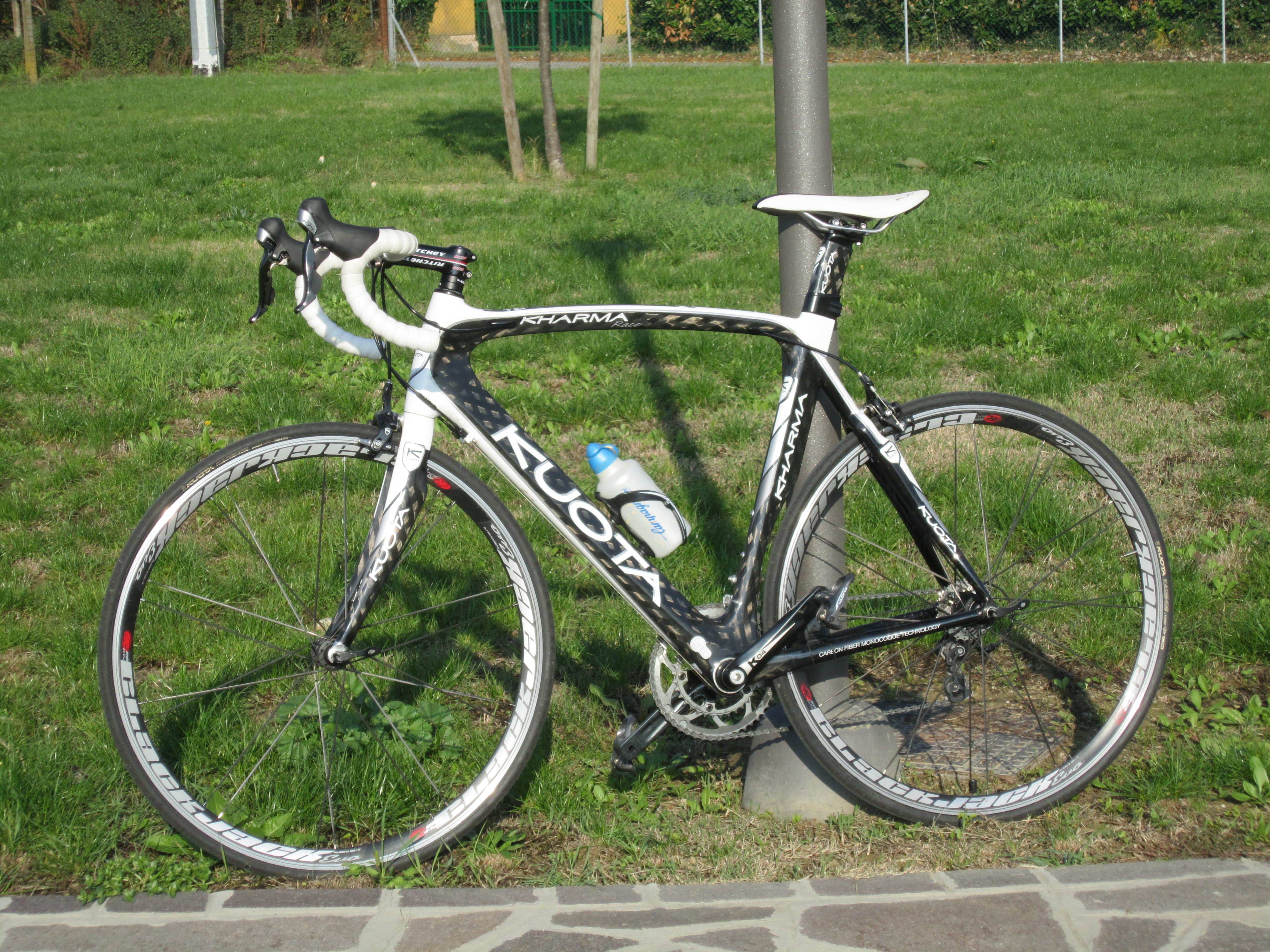 Bicicletta Kuota Kharma, foto propria